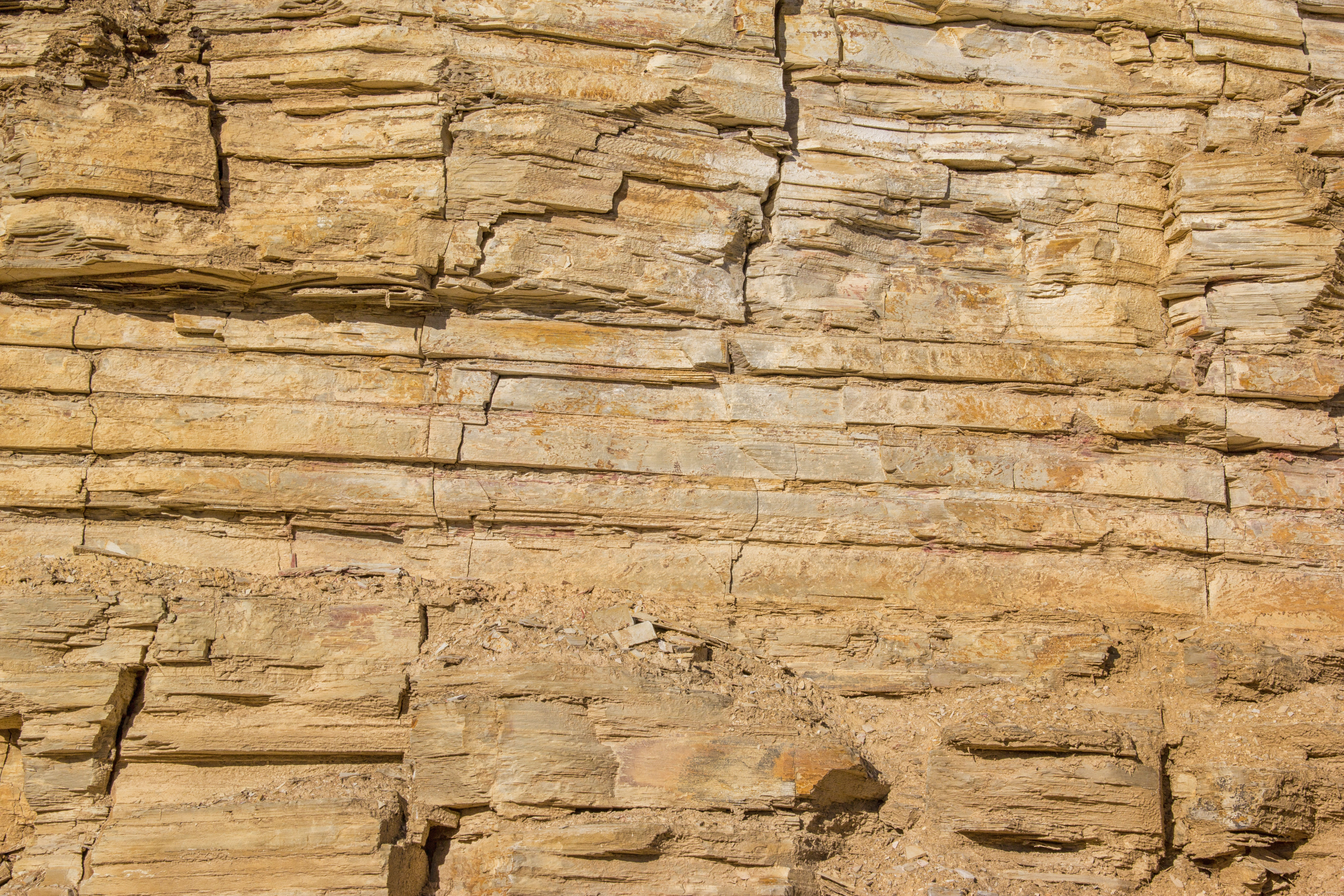 Steinbruch, Blumenberg bei Eichstätt, Naturpark Altmühltal